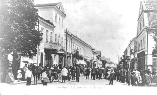 Советская улица в Гродно